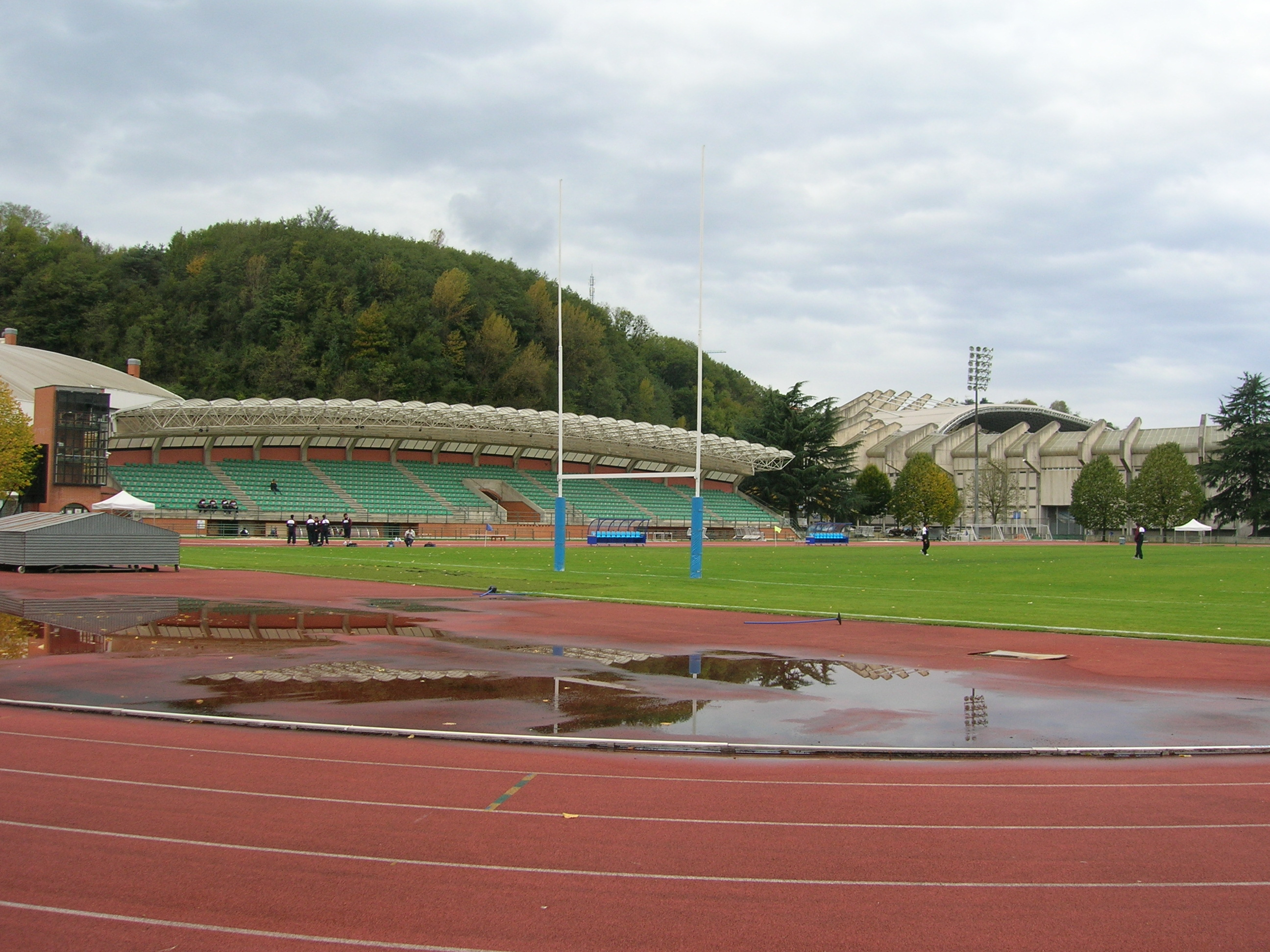 Miniestadio de Anoeta